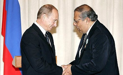 Вручение ордена Дружбы директору Центра русских исследований при Университете им.Дж.Неру, президенту Делийской ассоциации выпускников советских и российских вузов Санкаре Басу.